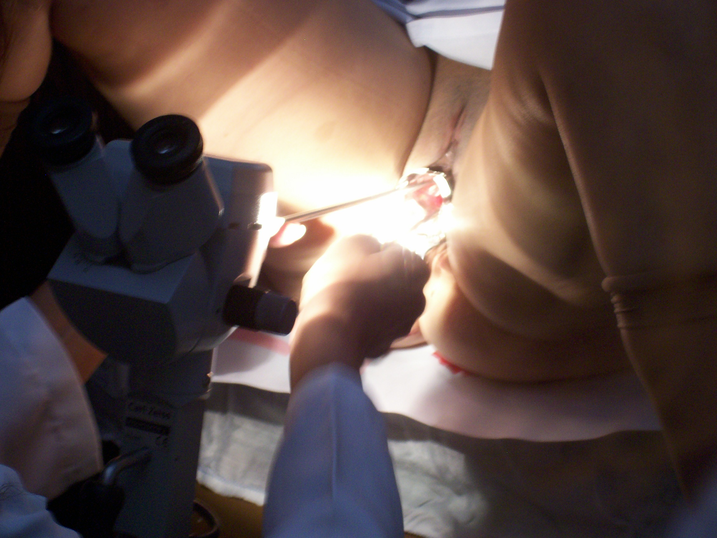 Examen ginecológico - Hospital Central de Maracay